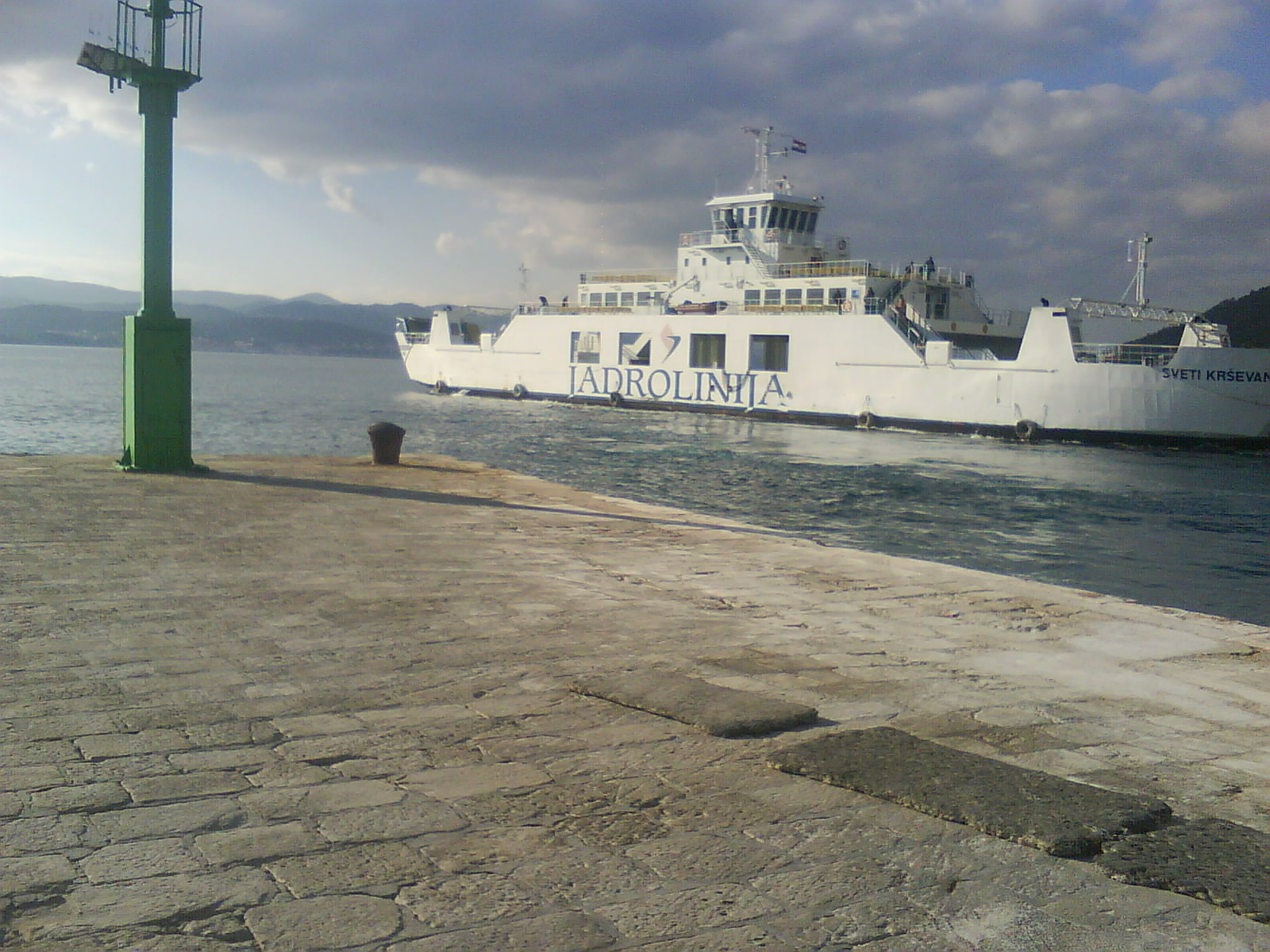 Orebić port IMO number: 9326562 Name: SVETI KRSEVAN